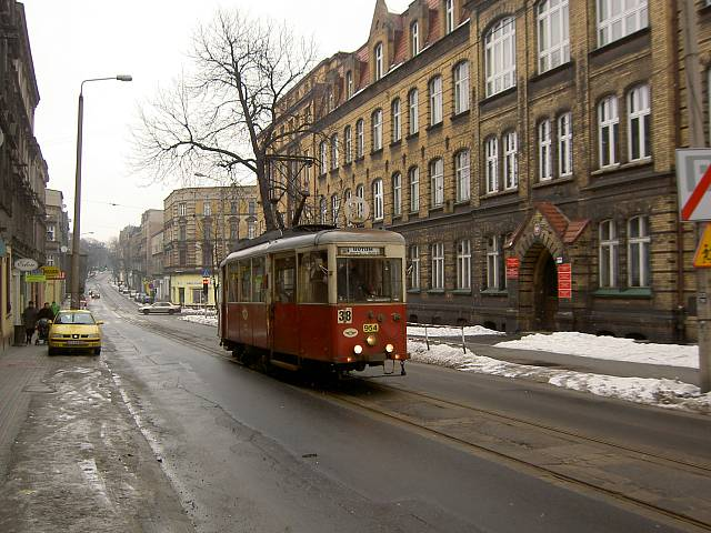 Konstal N type tram (#964), Piekarska Str., Bytom, Poland.